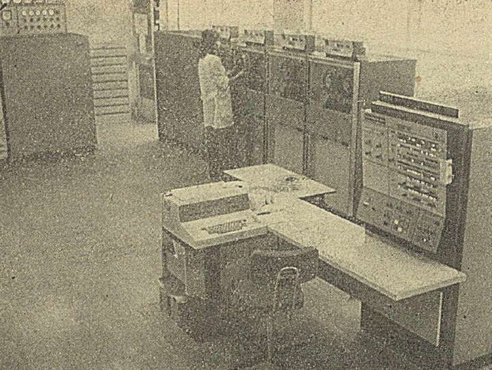 IBM-360/40 w Starachowicach FSC, pamięć zewnętrzna